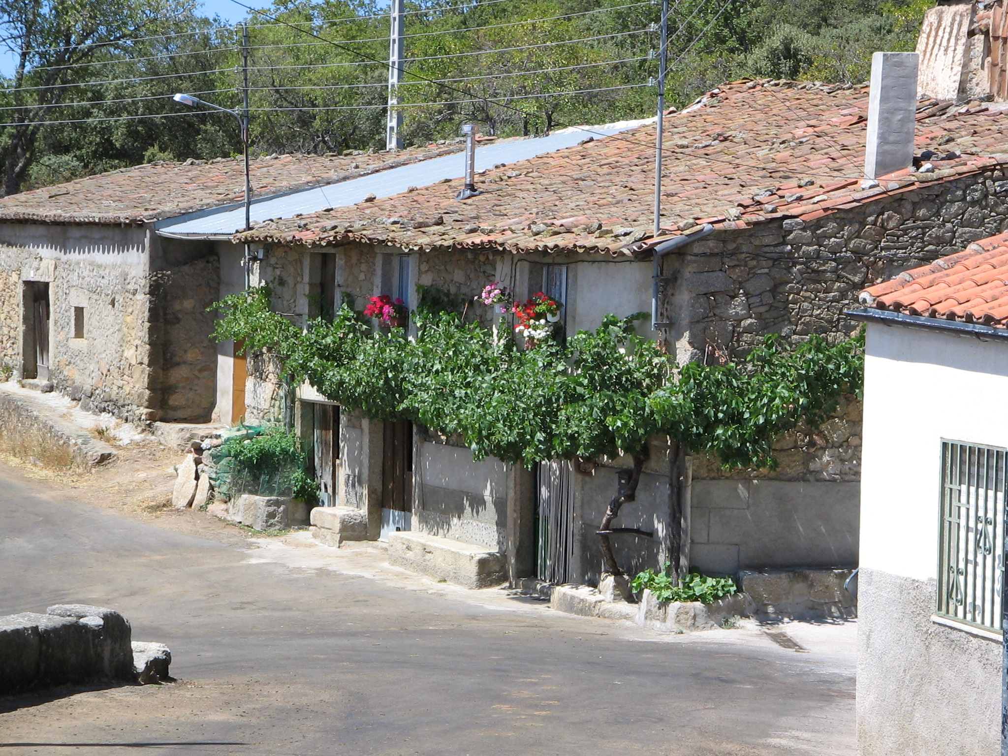 Puebla de San Medel vista de casa en la calle Constitución